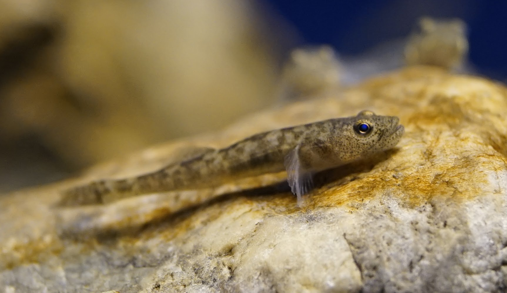 イサザ Isaza Domain: Eukaryota • Regnum: Animalia • Phylum: Chordata • Subphylum: Vertebrata • Infraphylum: Gnathostomata • Superclassis: Osteichthyes • Classis: Actinopterygii • Ordo: Perciformes • Familia: Gobiidae • Genus: Gymnogobius Wikispecies has an entry on: Gymnogobius isaza. Species Gymnogobius isaza (Tanaka,1916) 動物界 脊索動物門 条鰭綱 スズキ目 ハゼ科 ウキゴリ属 Location: Lake Biwa Museum, Japan Other photos: NCBI Taxonomy ID:178220 EOL link: Gymnogobius isaza uBio search link: Gymnogobius isaza